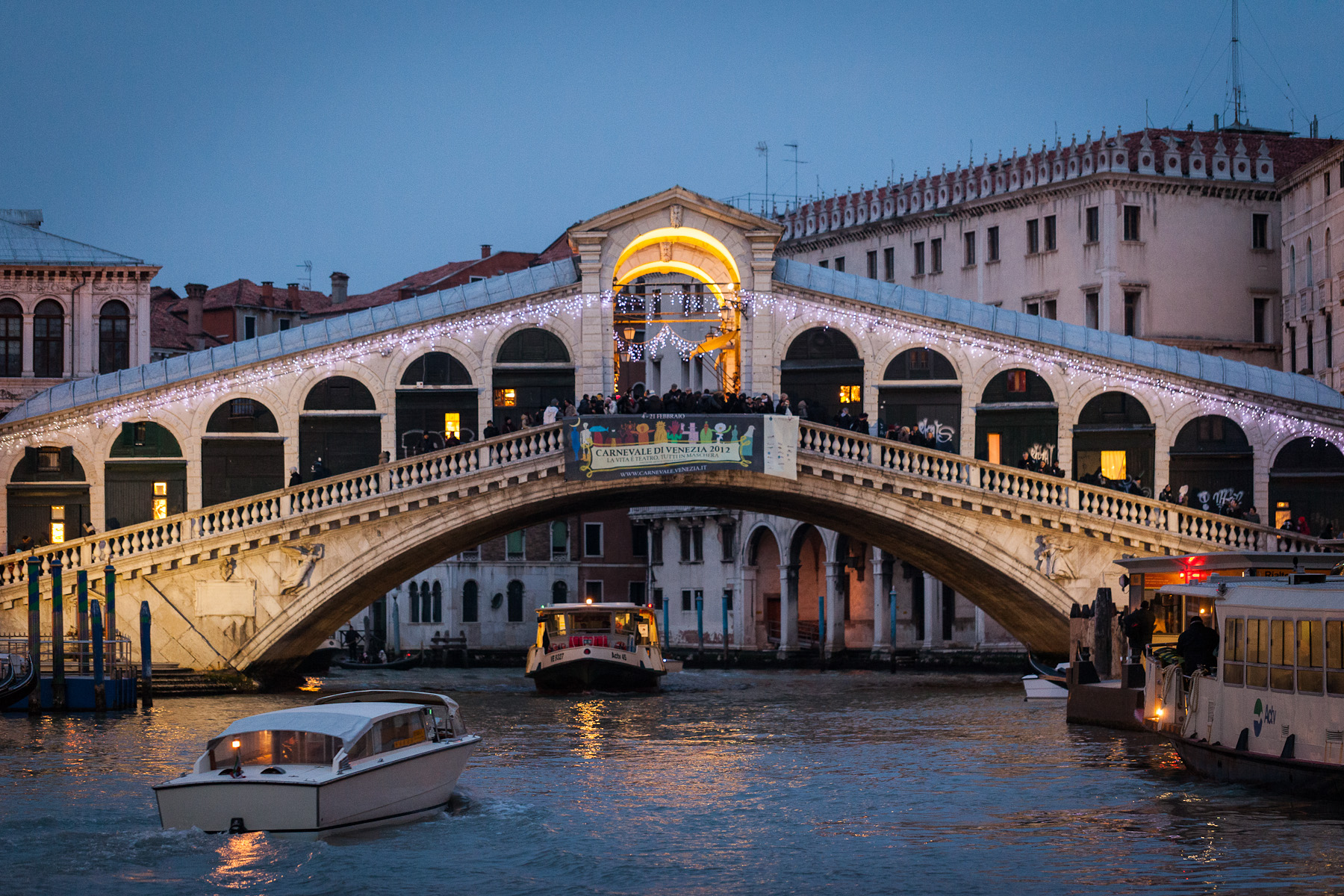 Carnevale